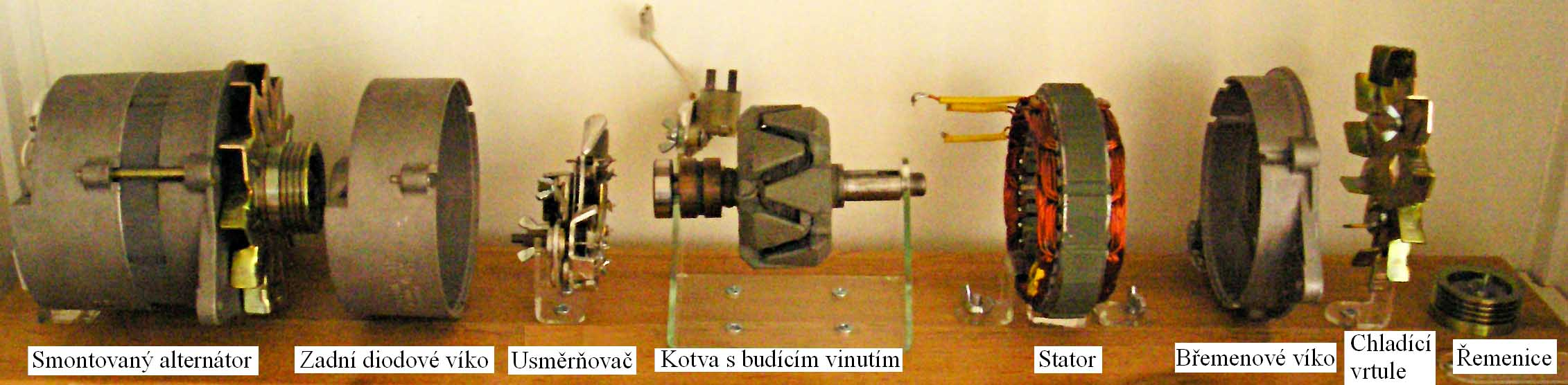 Model alternátoru Škody Felicia s českým popisem